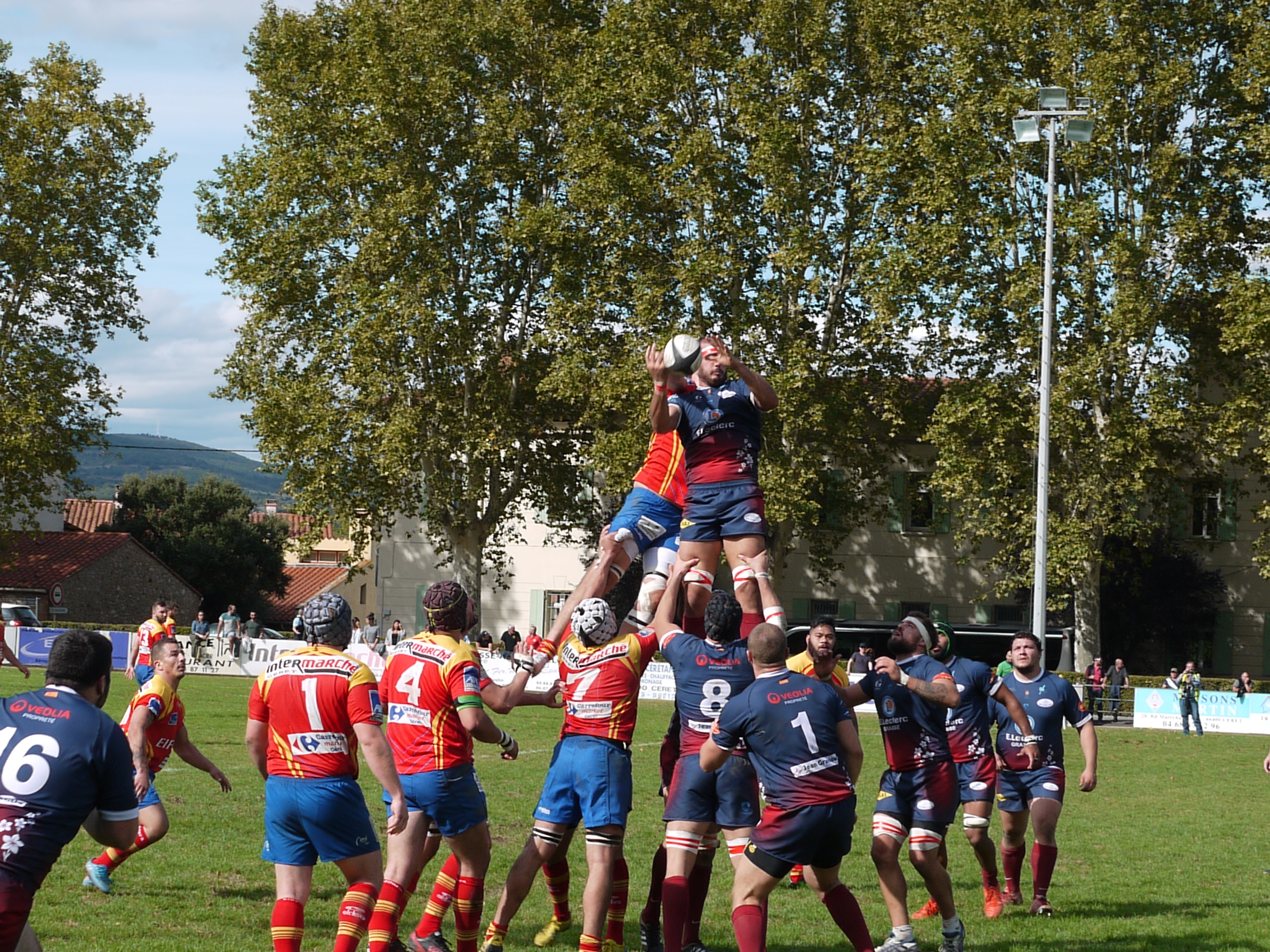 Match Céret sportif vs RO Grasse à Céret le 17 septembre 2017